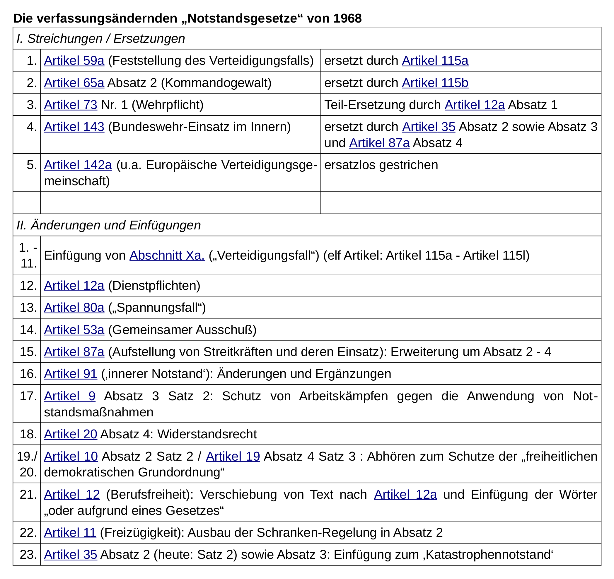 Die Tabelle listet alle 28 Artikel auf, die durch das Siebzehnte Gesetz zur Änderung des Grundgesetzes vom 24. Juni 1968 (sog. „Notstandsgesetze“) gestrichen, geändert oder neu eingefügt wurde. In der .pdf-Version der Tabelle ( S. 7) verlinken die Artikel zum Text der alten bzw. neuen Artikel-Version bei (hrsg. von Rechtsanwalt Dr. Thomas Fuchs); soweit möglich, unter synoptischer Gegenüberstellung von alter und neuer Fassung.